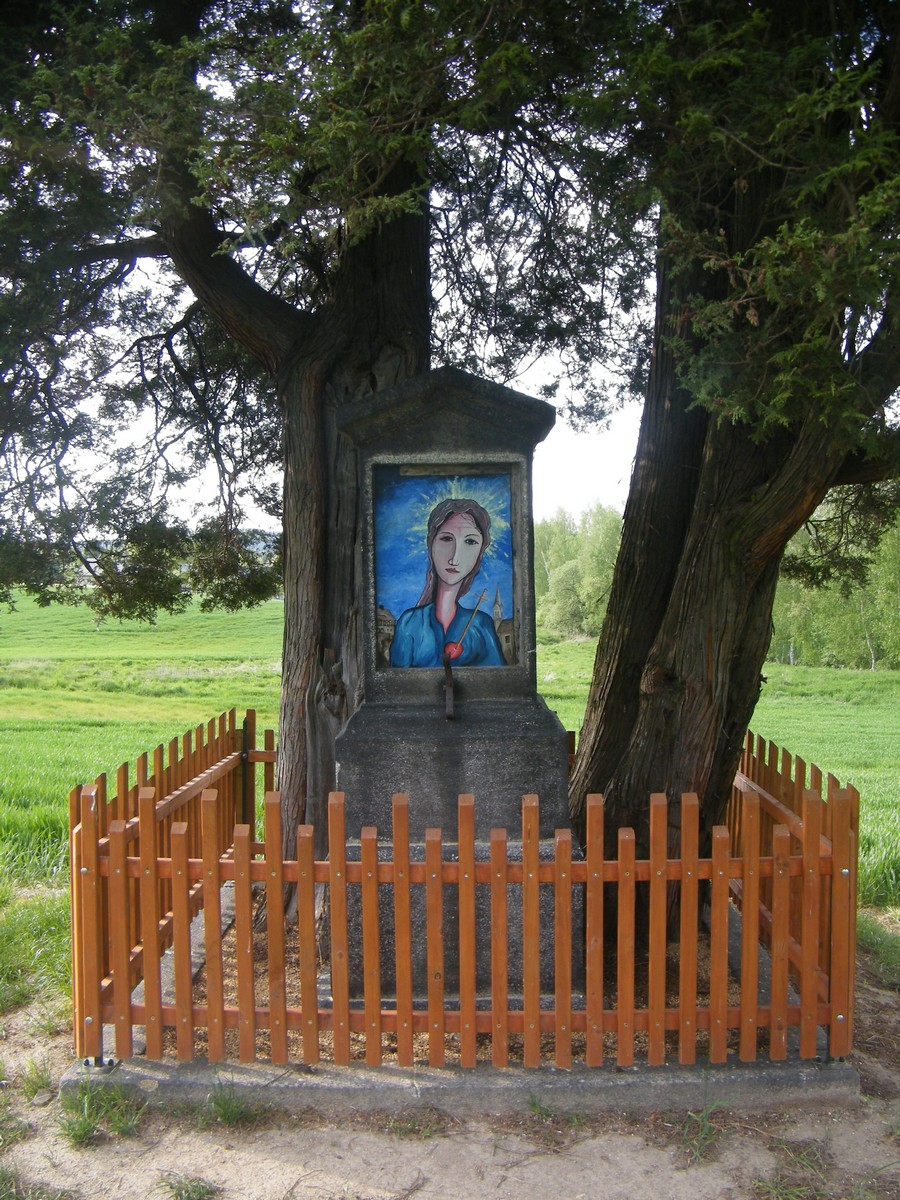 Boží muka ve Fukově